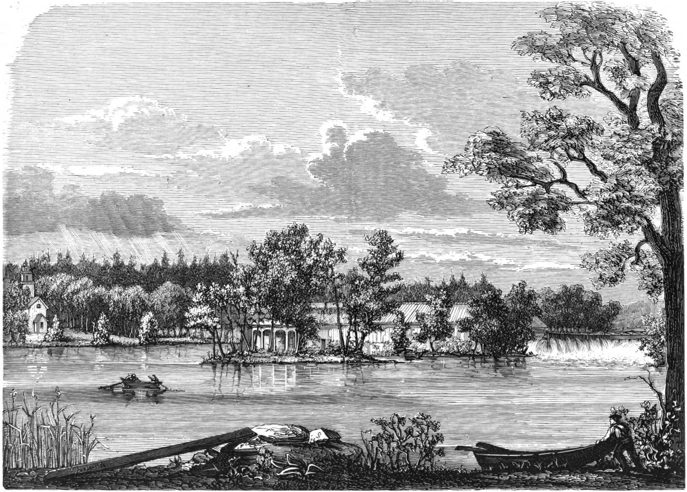 Billingsfors bruk vid Laxsjön i Dalsland.